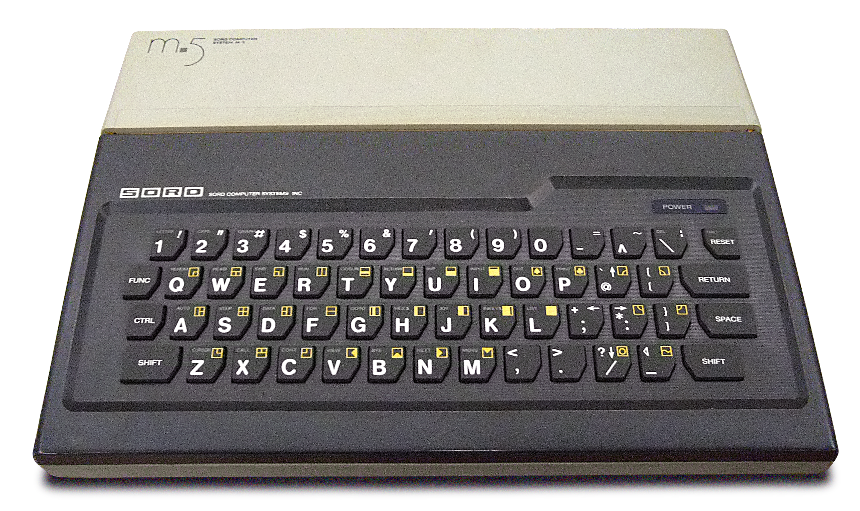 Sord M5. Photo taken at Retro Gatering, Stockholm, 27 Sep 2008.